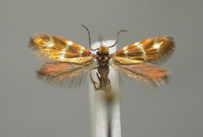 Micropterix aureoviridella